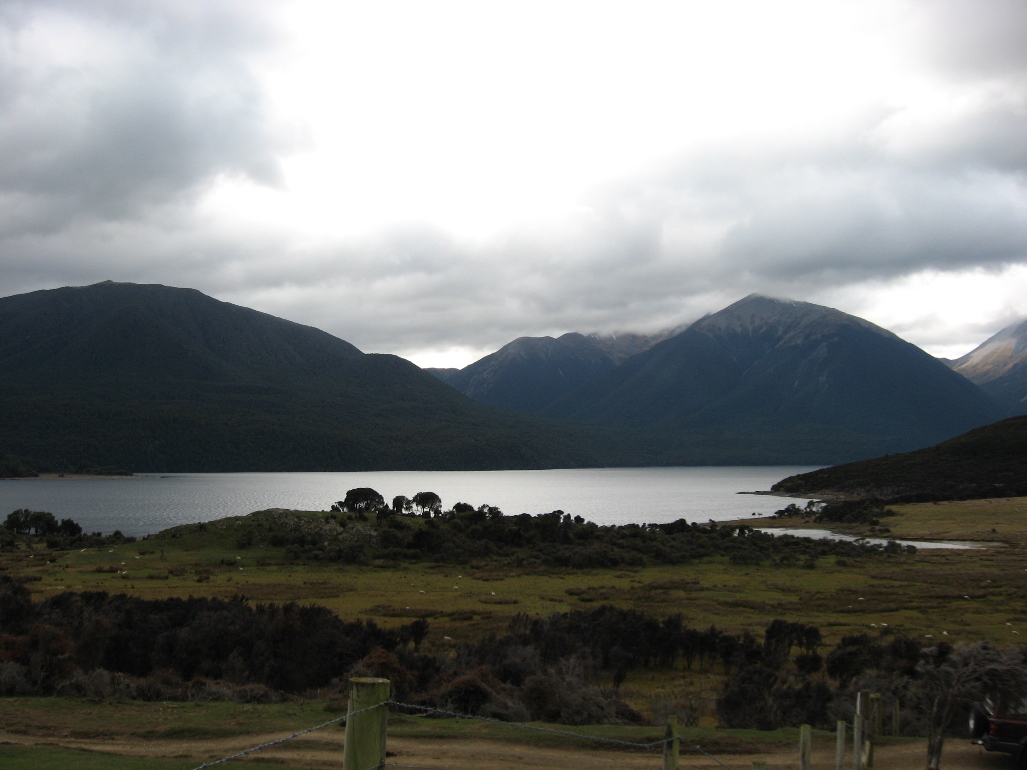 Lake Sumner, Lake Sumner Forest Park, New Zealand